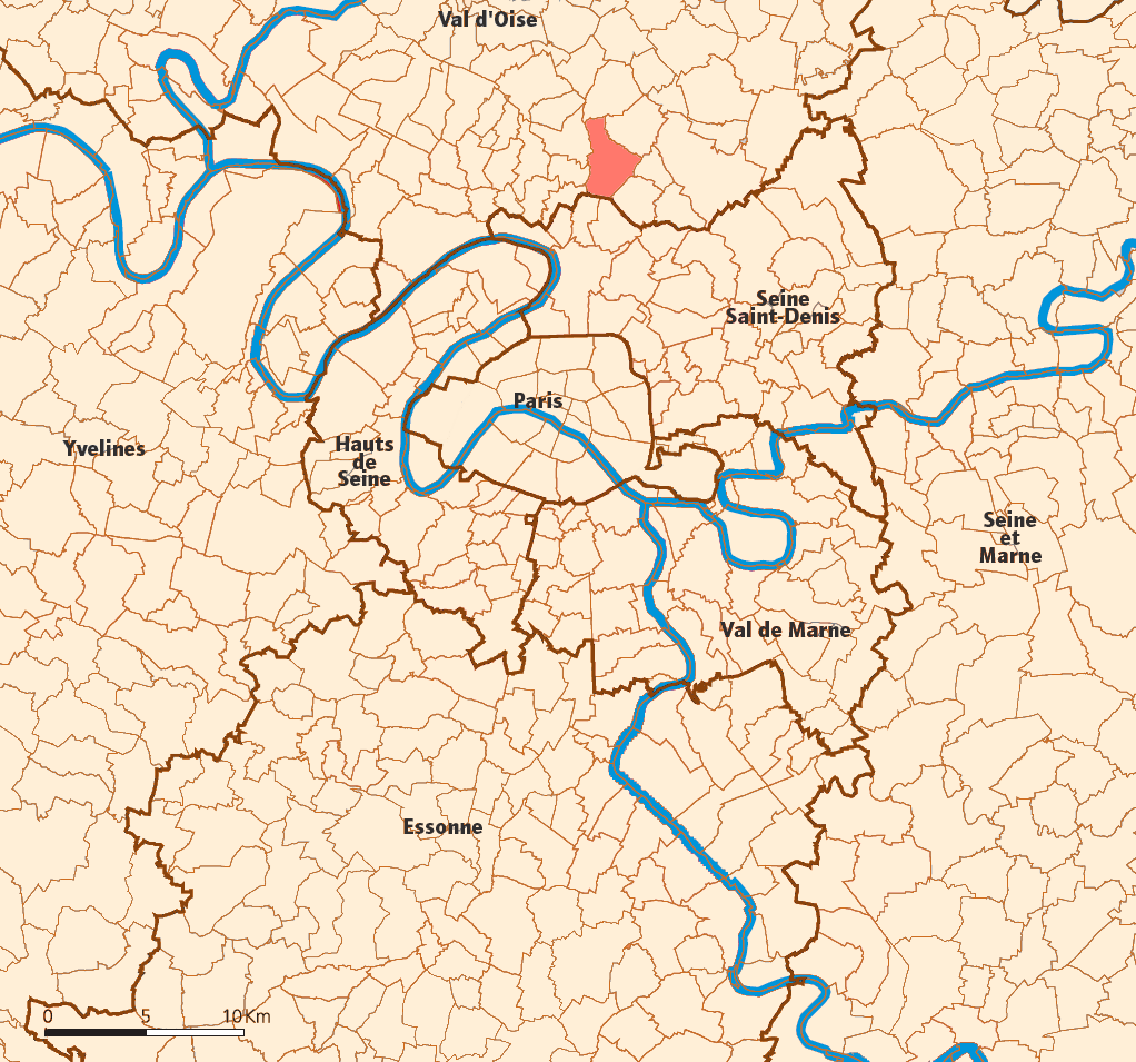 Sarcelles